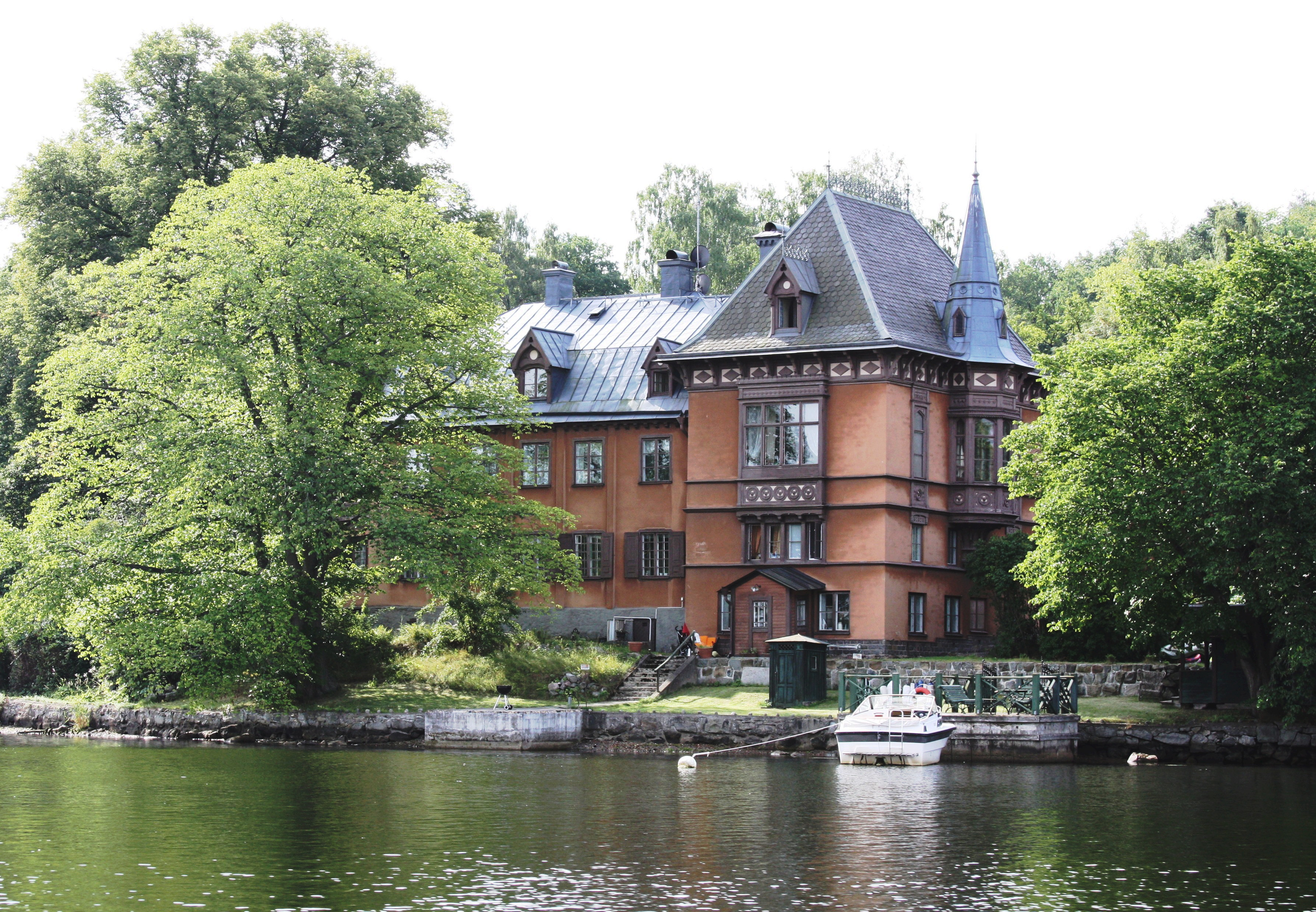 Stockholm